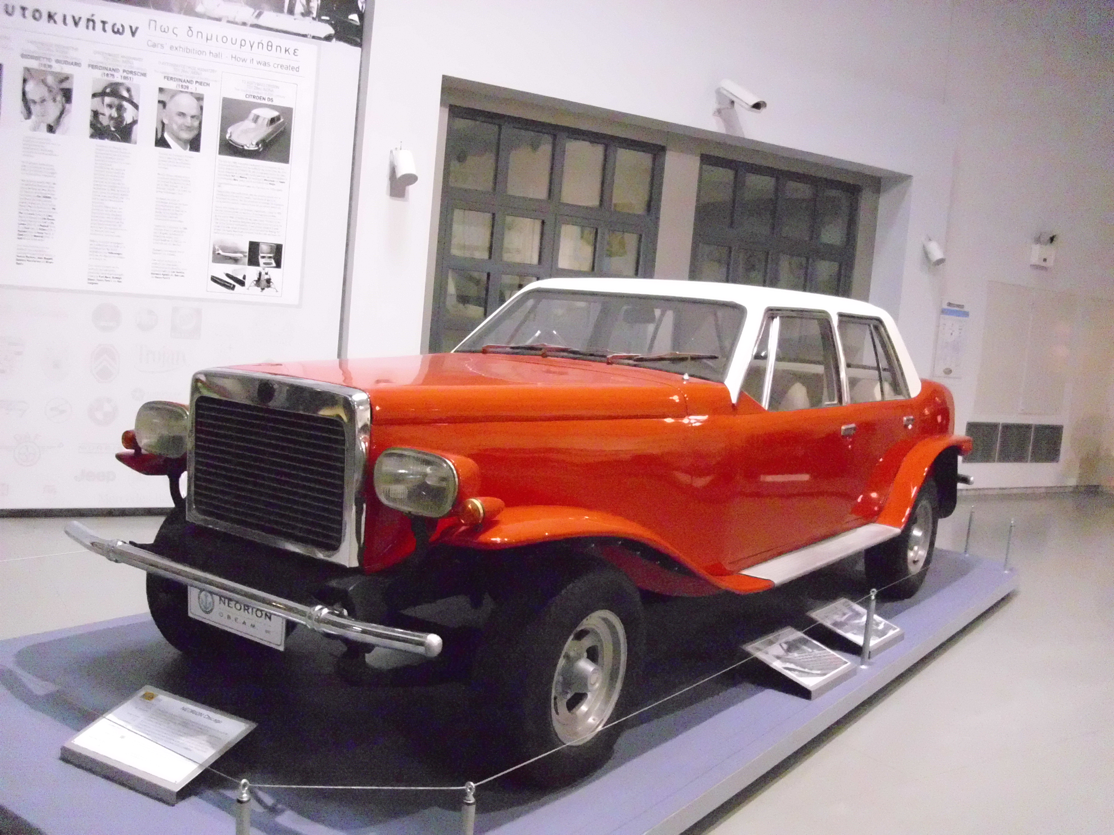 Neorion Chicago von 1974 im Noesis-Technikmuseum in Thessaloniki.